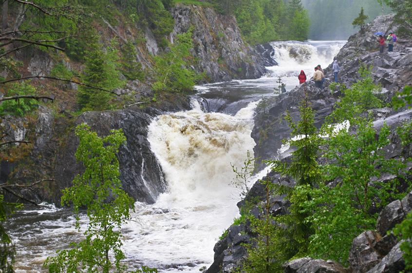 Kivach Waterfalls, Karelia